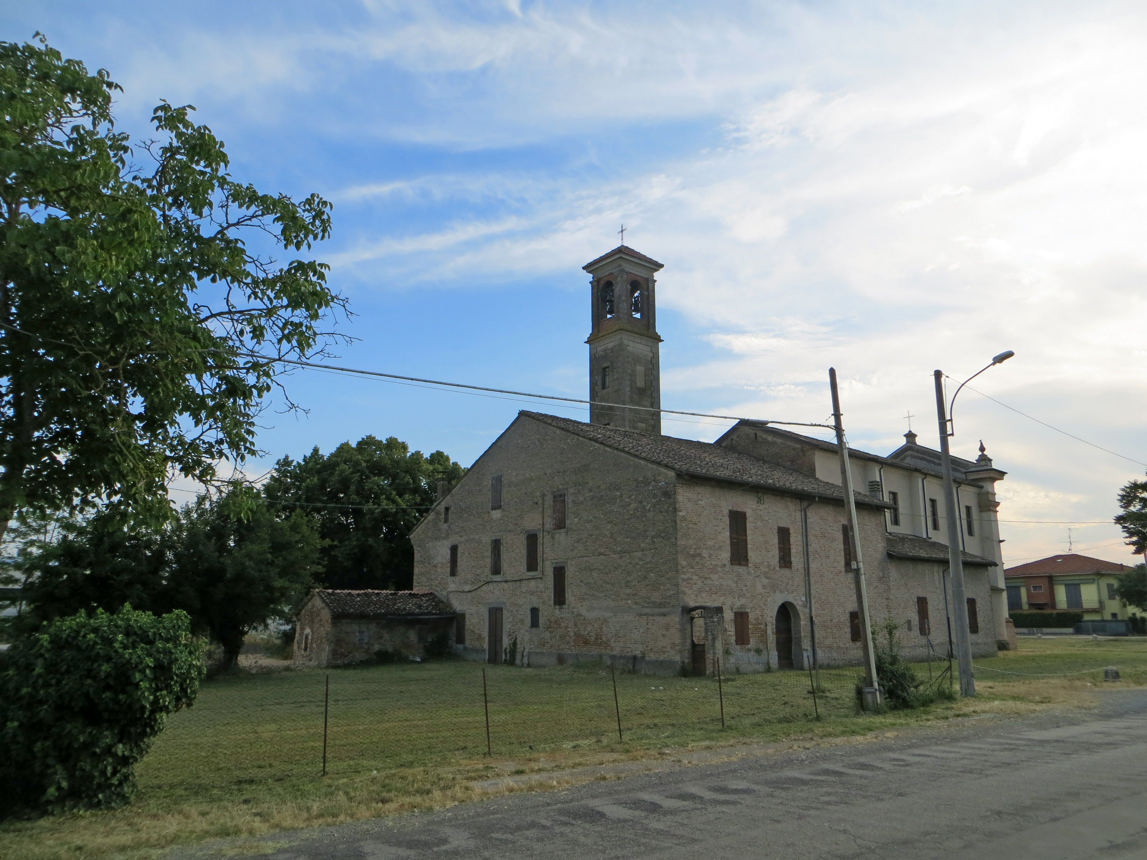 Chiesa di San Pietro (Castellina, Soragna) - retro e lato nord